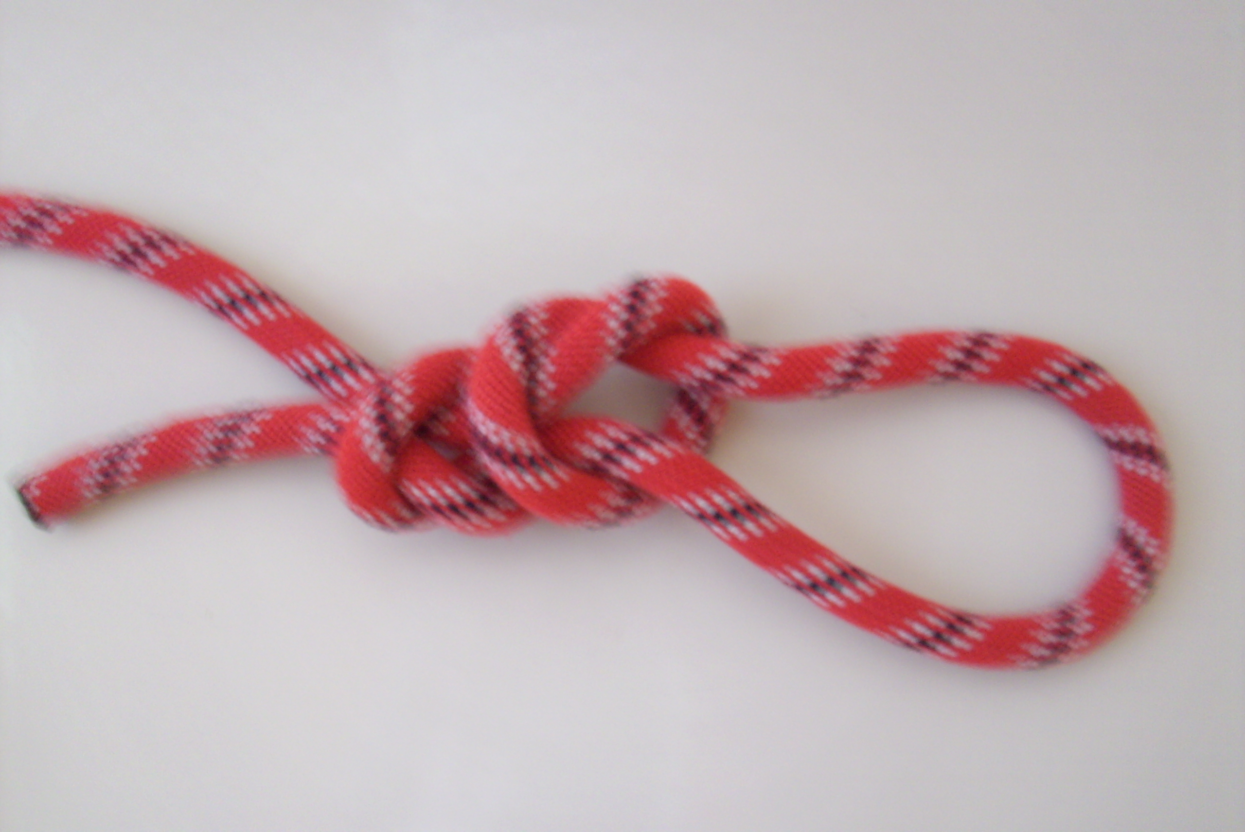 Spierenstich als Schlaufe.